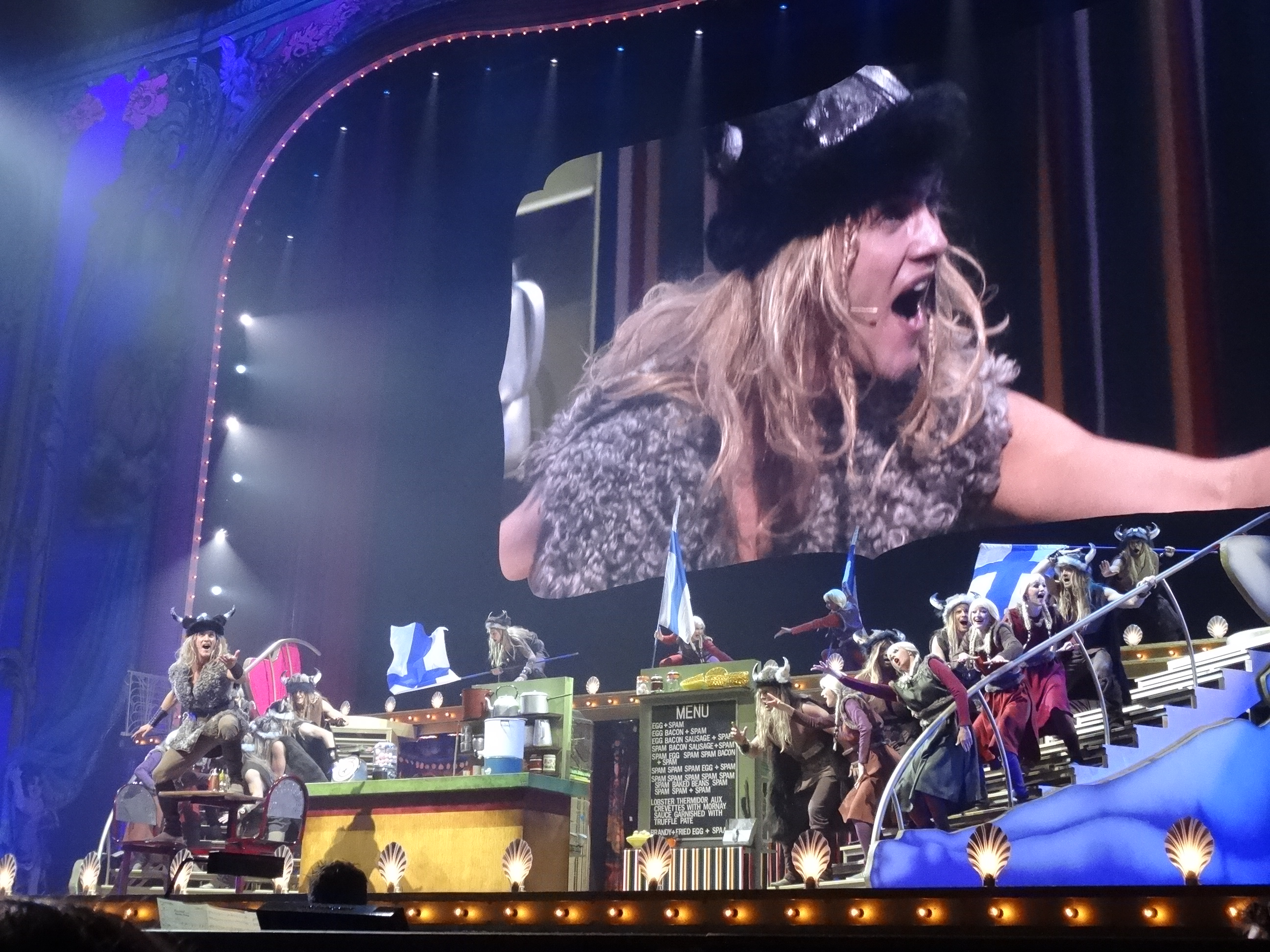 Photo 02-07-14 13 07 32